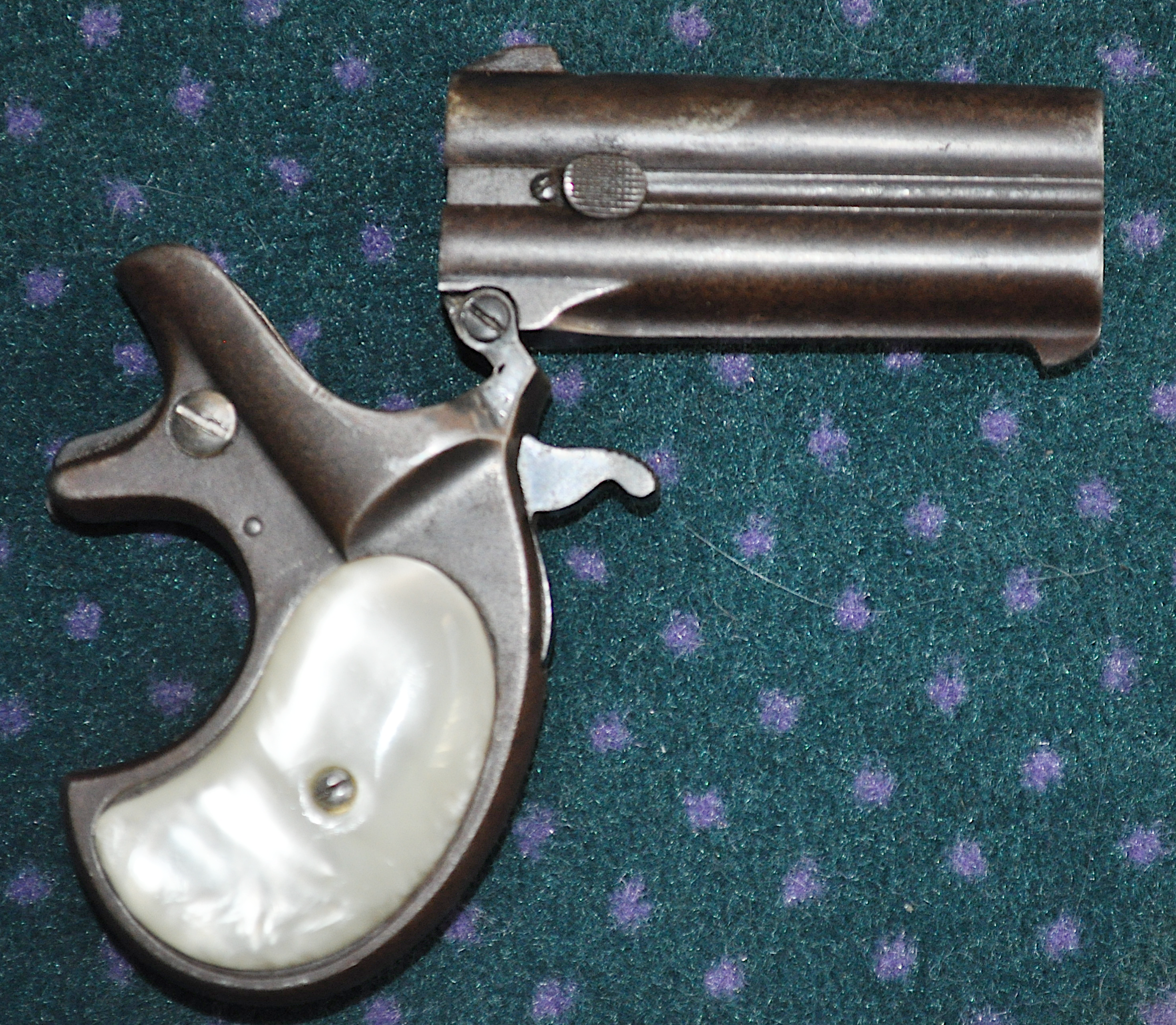 Geopende 4de generatie derringer